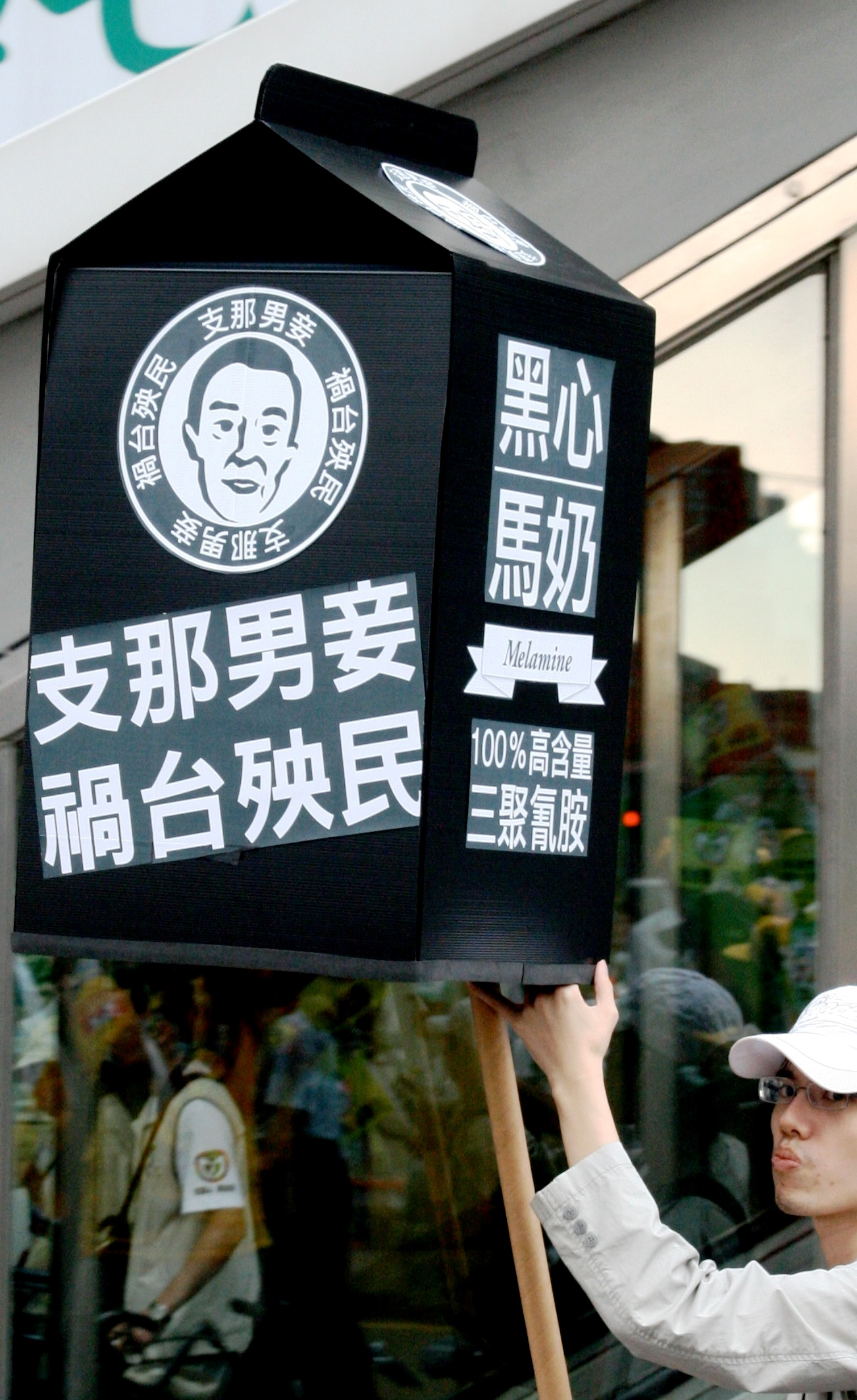 2008年10月25日 反馬嗆中大遊行－台大線